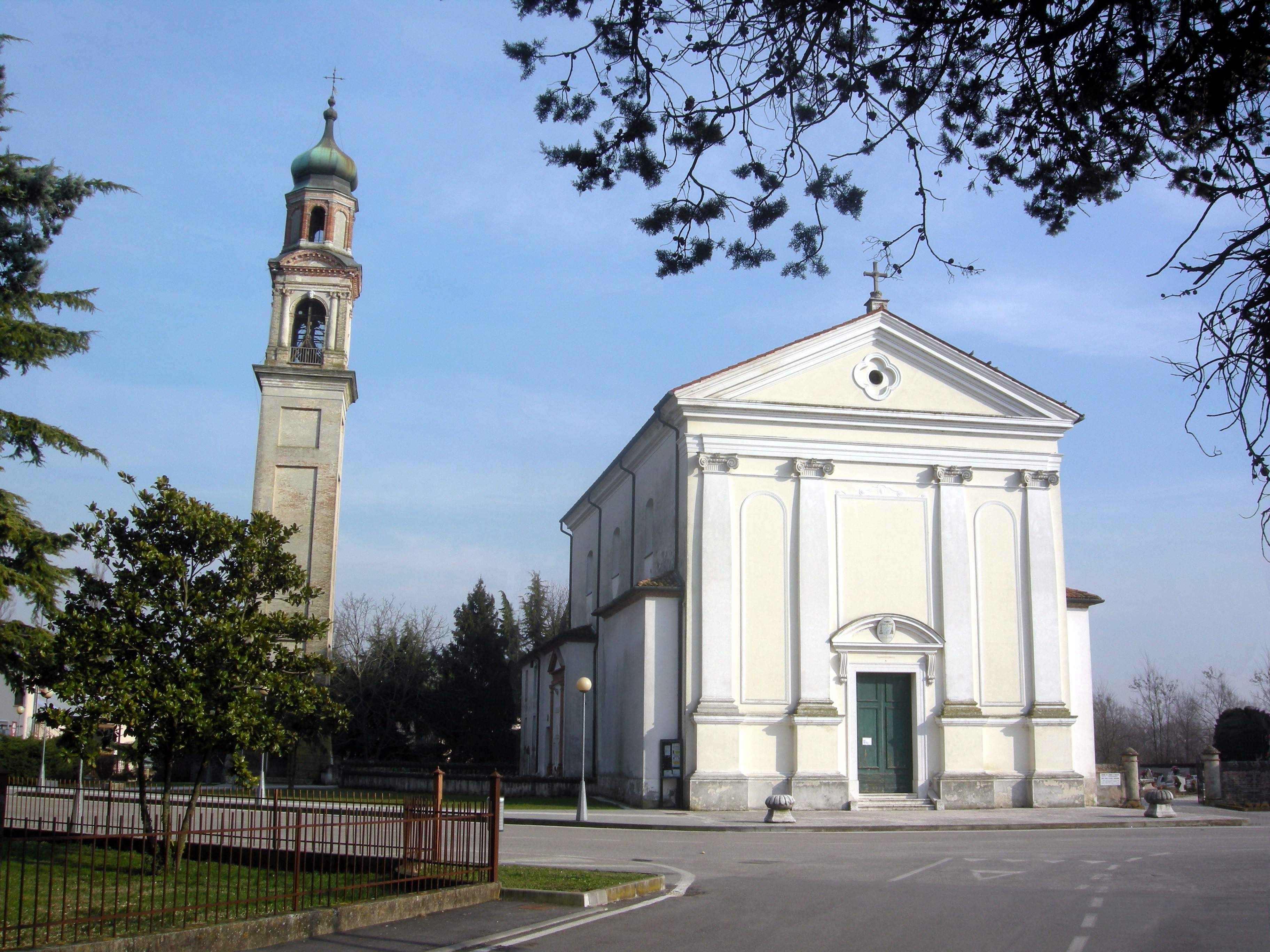 Cervellin, opera propria, chiesa di Spercenigo, lic. GFDL, data, 20.02.2009